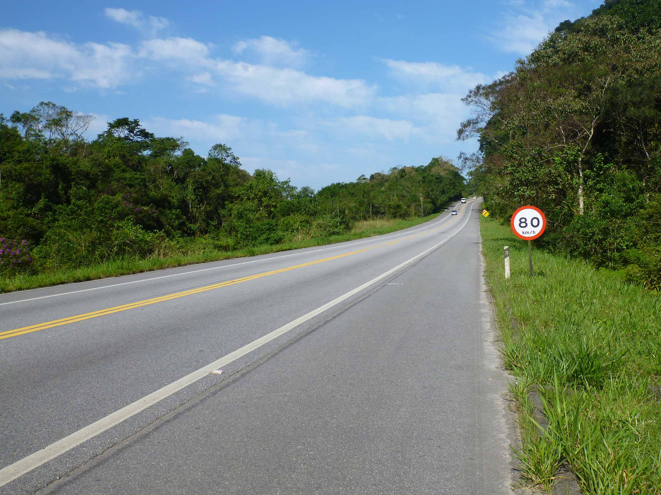 La BR-101 a su paso por el estado de São Paulo, en Brasil.